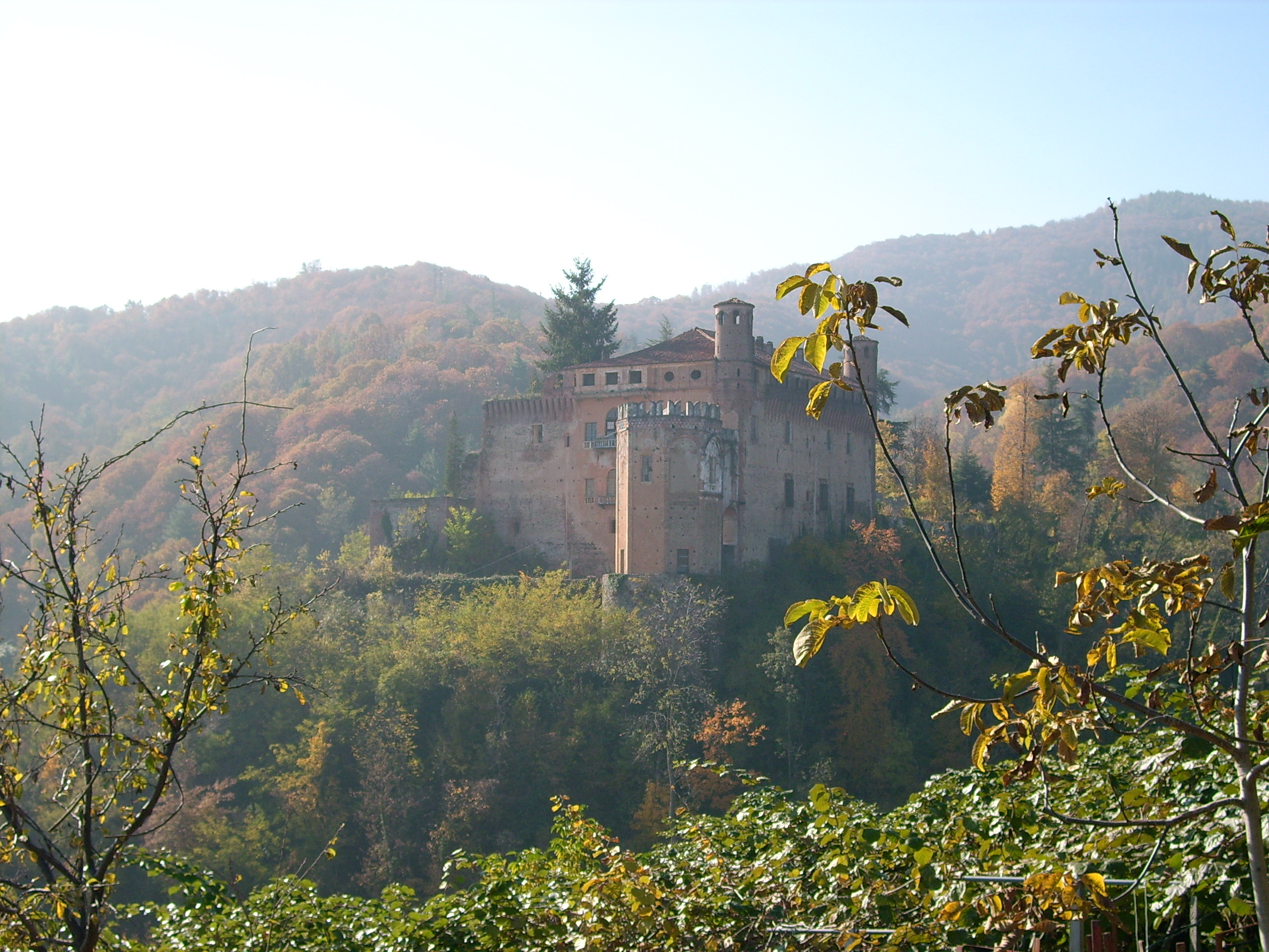 Castello di Verzuolo, Piemonte, Italia